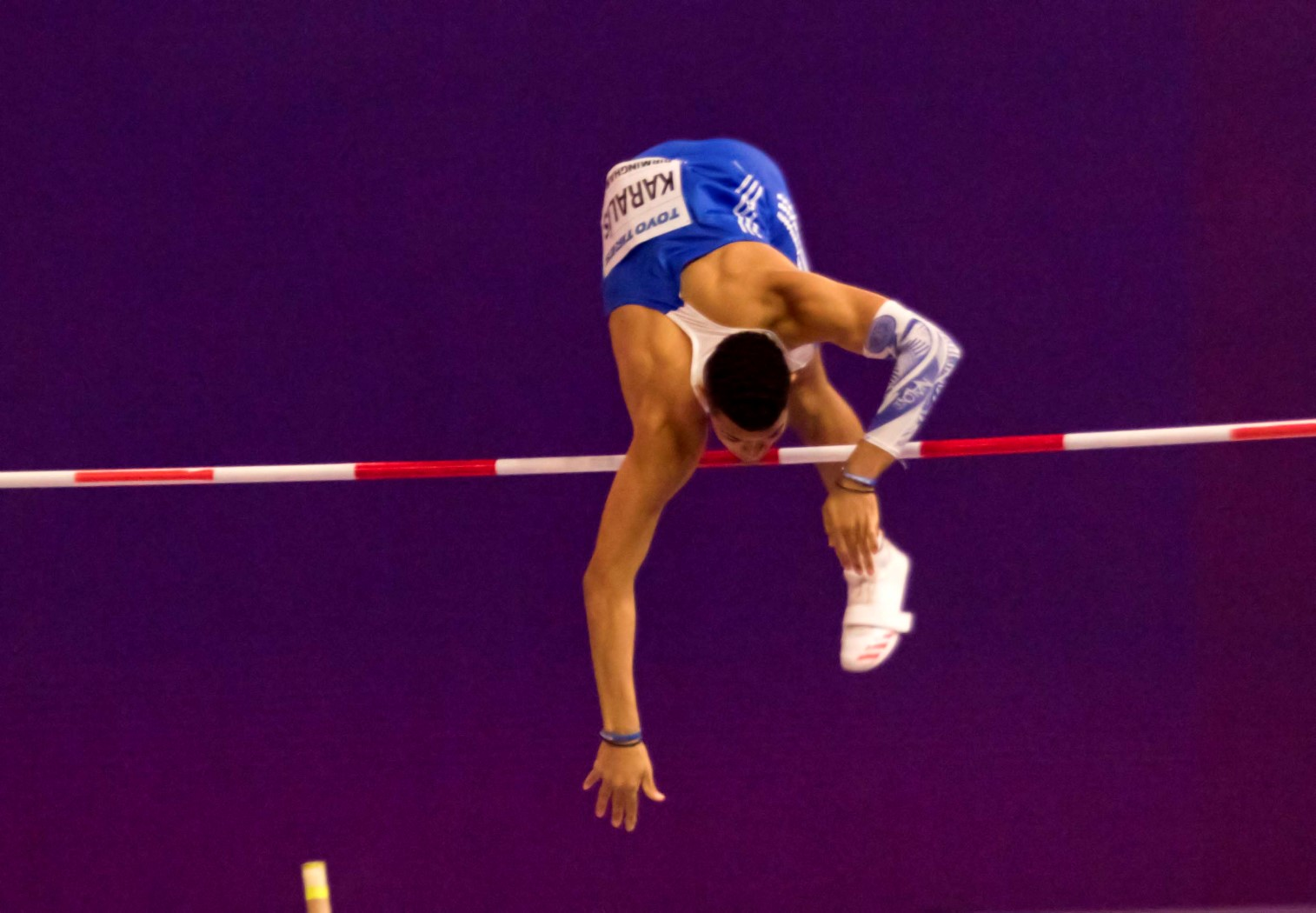 WK040202 polsstok karalis